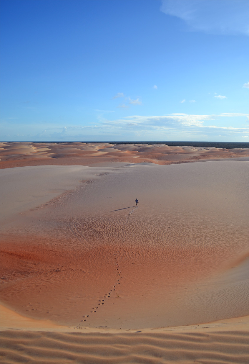 Dunas que ficam entres as cidades de Areia Branca e Porto do Mangue - RN, que são protegidas pela policia ambiental.